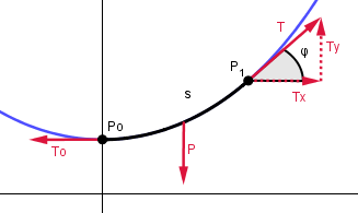 Gráfico construído no Geogebra com melhor visibilidade da catenária e vetores importantes para o entendimento da demonstração da equação que descreve a curva.